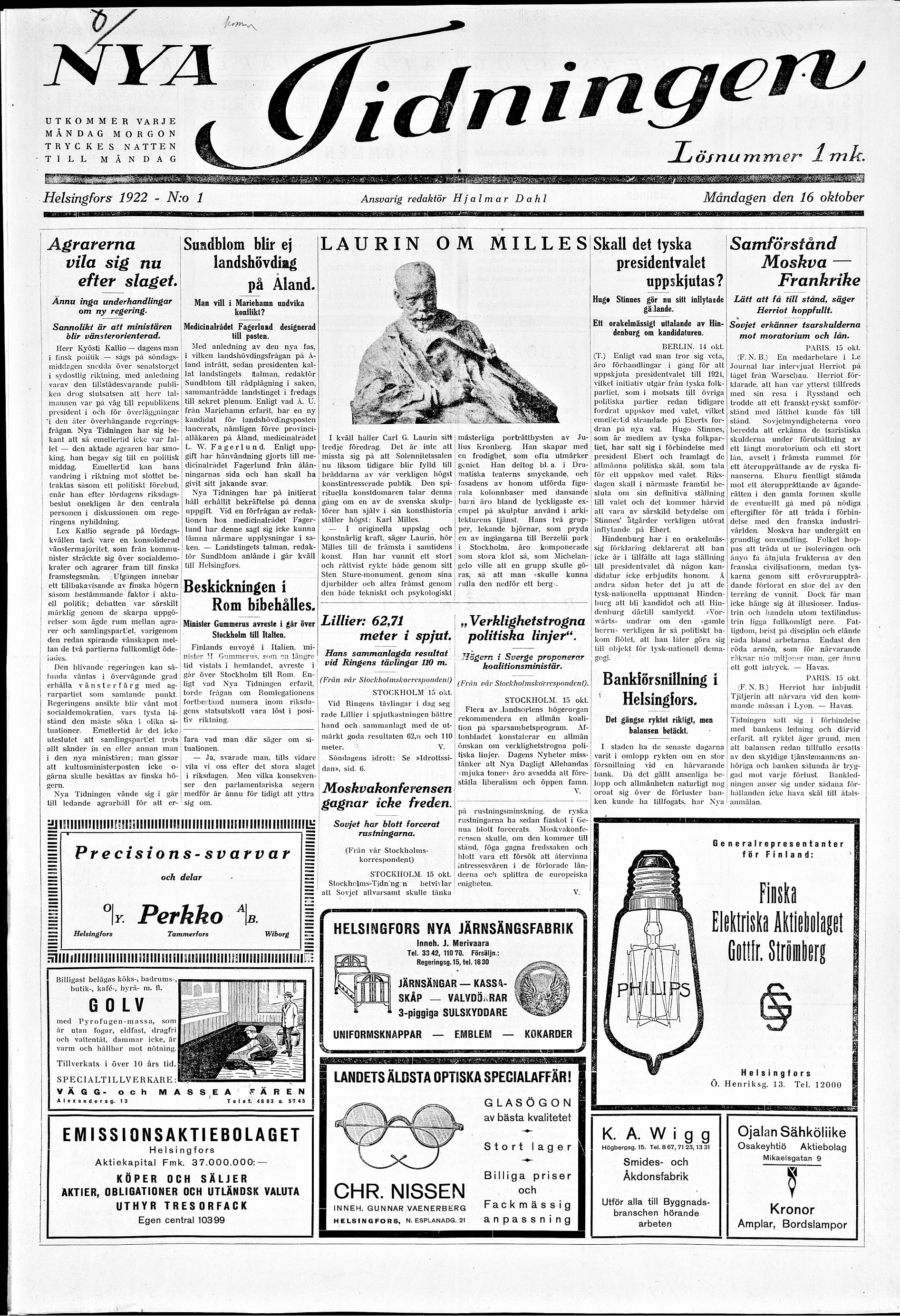 Nya Tidningen -lehden ensimmäisen numeron etusivu